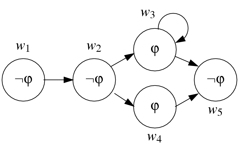 Kripke model example